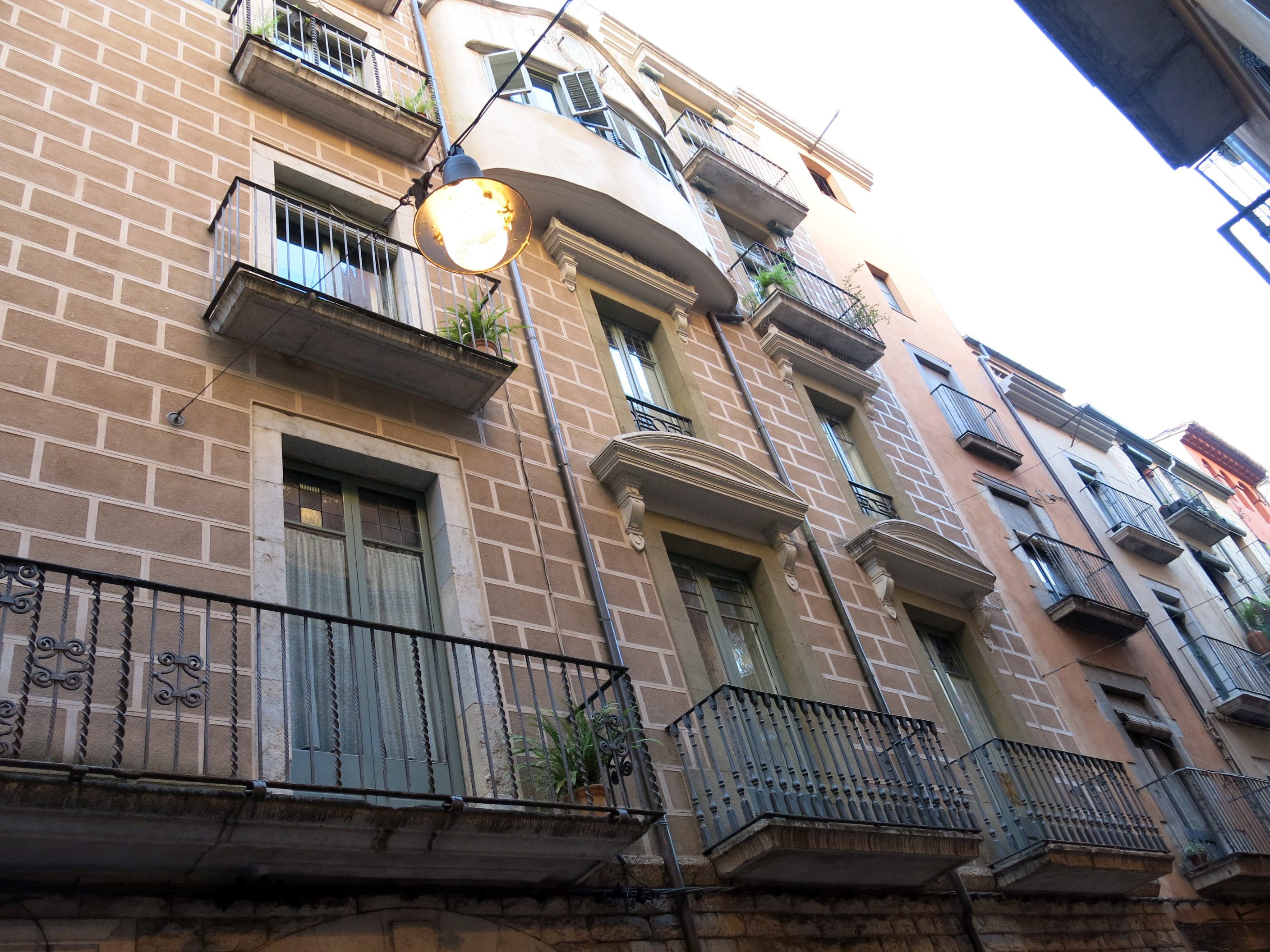 Casa Masó (Girona)